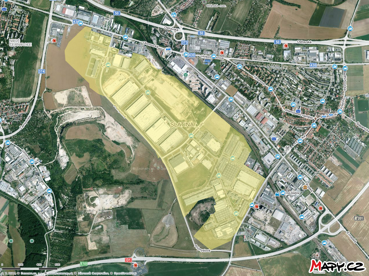 Letecký snímek průmyslové zóny Černovická terasa (zvýrazněna), která se rozkládá na části území brněnských městských částí Slatina, Černovice a Tuřany (k. ú. Tuřany).